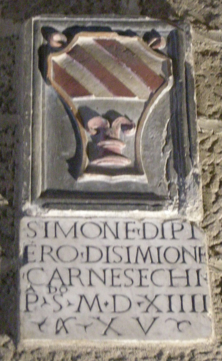 Palazzo dei priori di volterra, interno, stemma carnesecchi